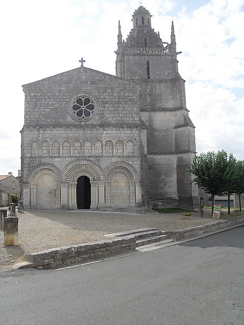 Église de Saint-Fort sur Gironde